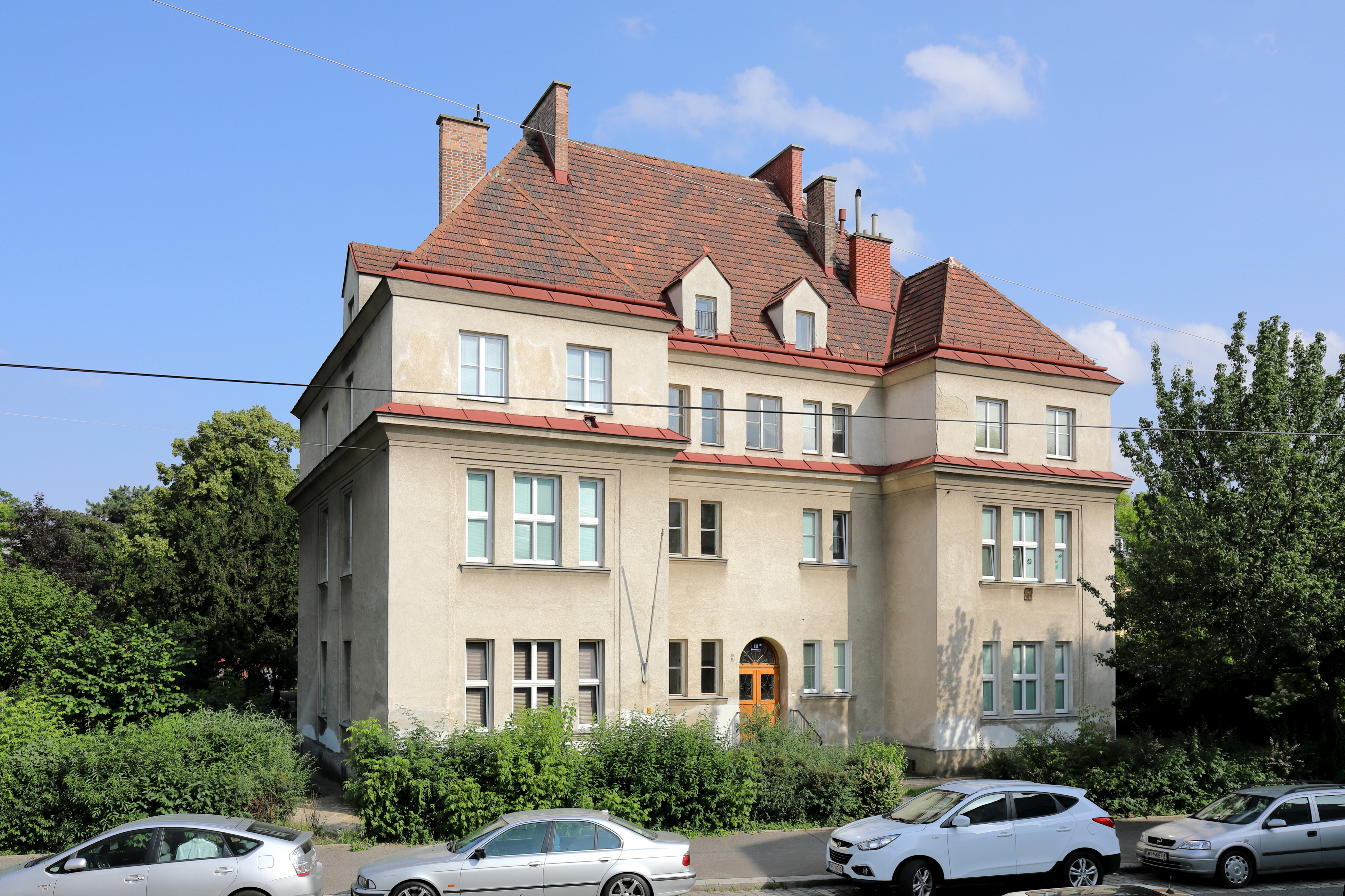 Das Wohnhaus der Gemeinde Wien an der Adresse Gerichtsgasse 10 im 21. Wiener Bezirk Floridsdorf. Der freistehende Gemeindebau wurde ursprünglich als Bezirksjugendamt von 1923 bis 1924 nach Plänen der Architekten Friedrich Jäckel und Wilhelm Peterle errichtet. Im Jahr 1950 erfolgte ein Umbau zu einem Wohngebäude. This media shows the Vienna residential building (Gemeindebau) with the ID 1493.